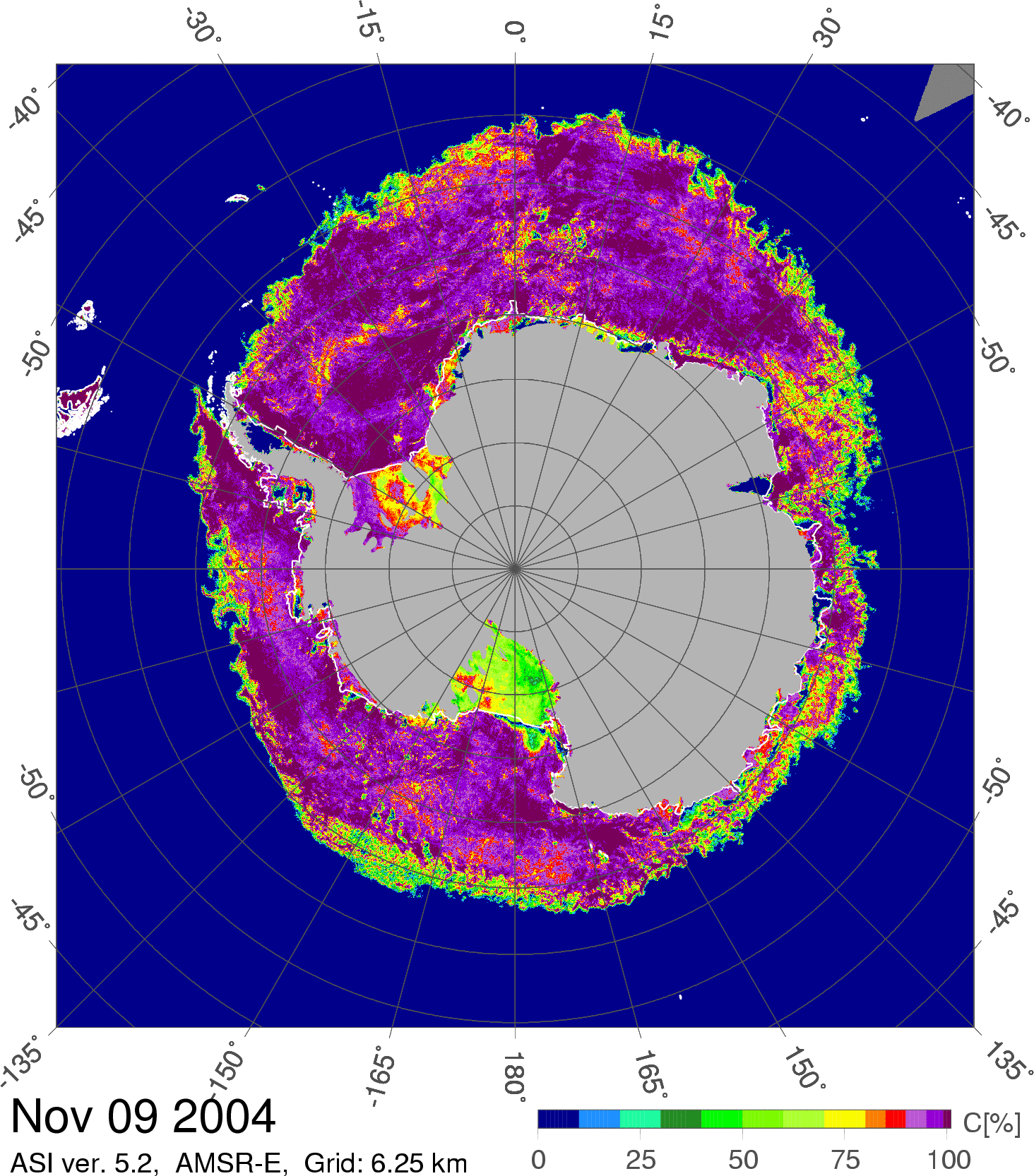 Antarctic sea ice distribution